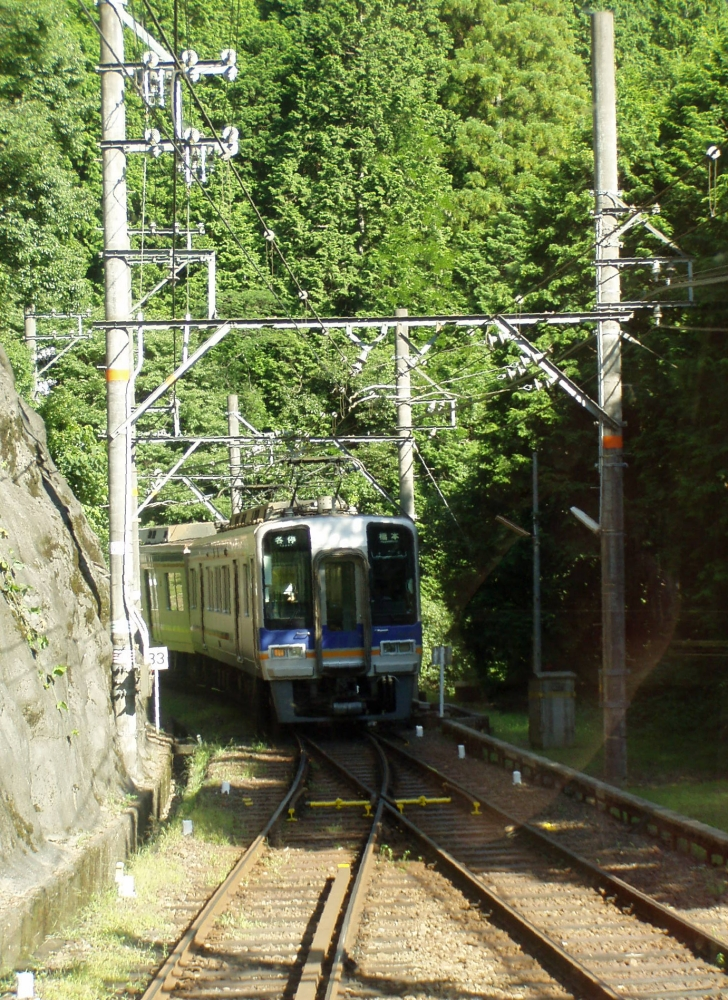 Kudoyama near Hashimoto. Koyasan-sen at Kami-Kosawa station.